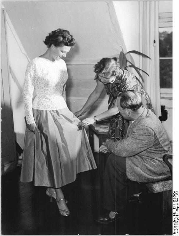 Zentralbild-Schlegel Zi-Sch. 5.9.1956 VEB Damenkonfektion Plauen hilft Damenkonfektion zu vergrössern. Die Kolleginnen und Kollegen des VEB Damenkonfetkion in Plauen sind bestrebt, duch Schöpfung neuer Modelle recht viel verschiedene Kleider und Blusen in den Handel zu bringen. UBz.: Wenn verschiedene Modelle fertig sind, führt das Entwurfsbüro der Betriebsleitung die neuen Modelle vor; in gemeinsamen Besprechungen werden dann noch eventuelle Änderungen am Modell vorgenommen (vorn) der technische Leiter Herbert Dölling und Modegestalterin Bernstein (rechts).